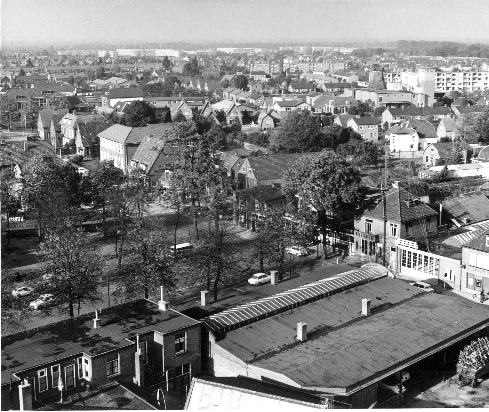 Kijkje op Ede vanaf de Oude Kerk, gezien richting Markt. Rechts onderin de markthal en rechts onderin naar links bovenin de Brouwerstraat.